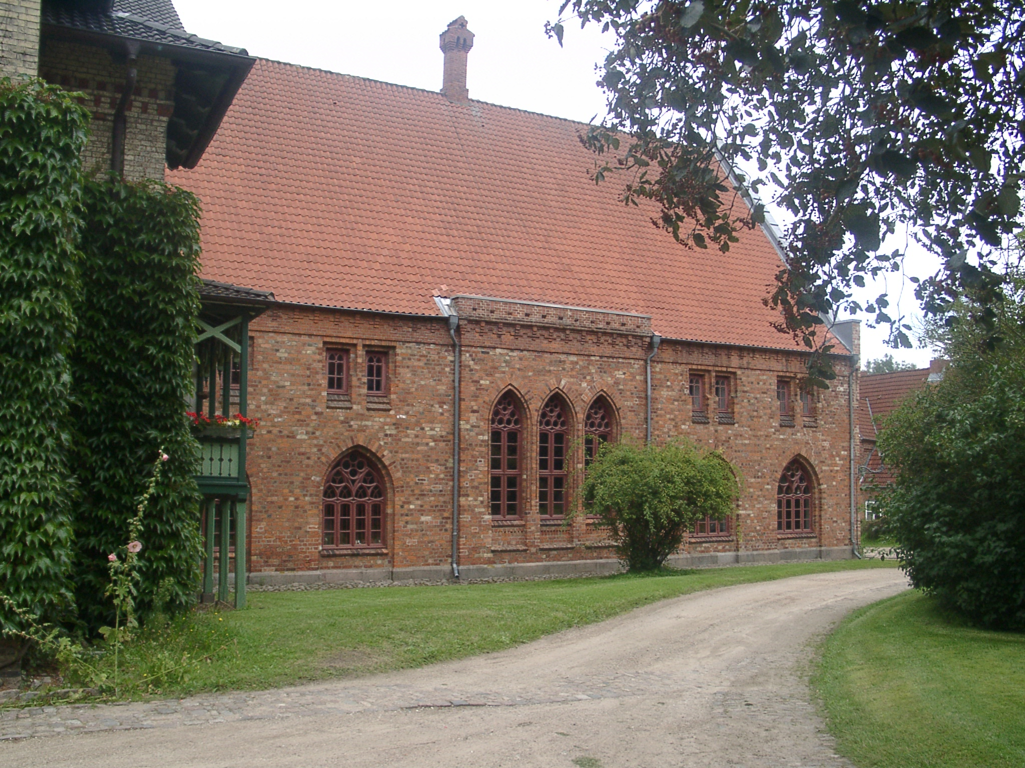 Kloster Preetz